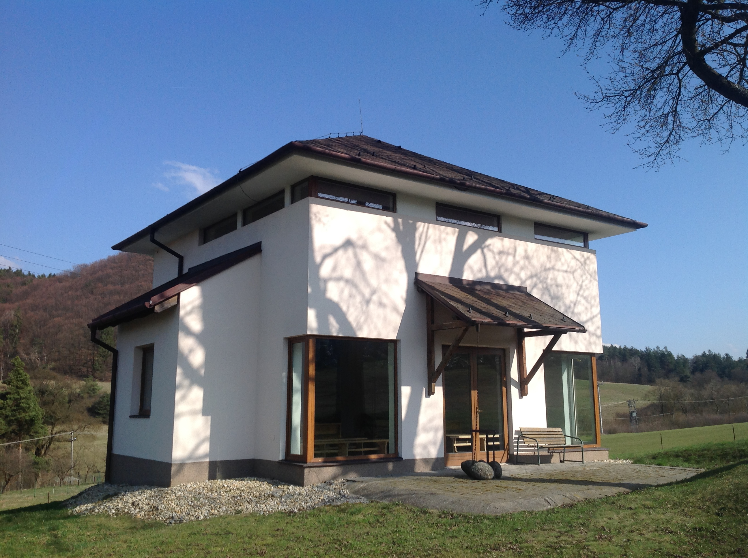 Dom smútku v samporskom cintoríne